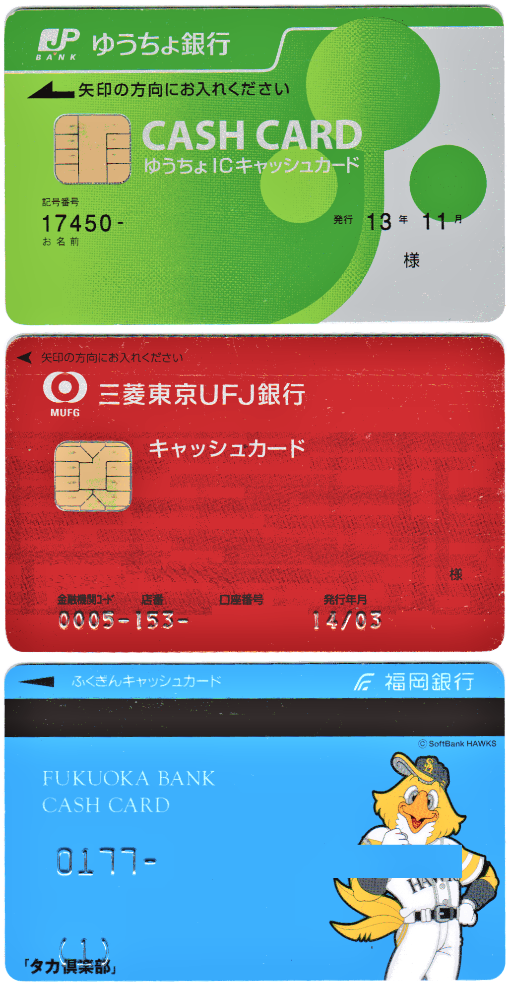 ゆうちょ銀行、三菱東京UFJ銀行、福岡銀行のキャッシュカード